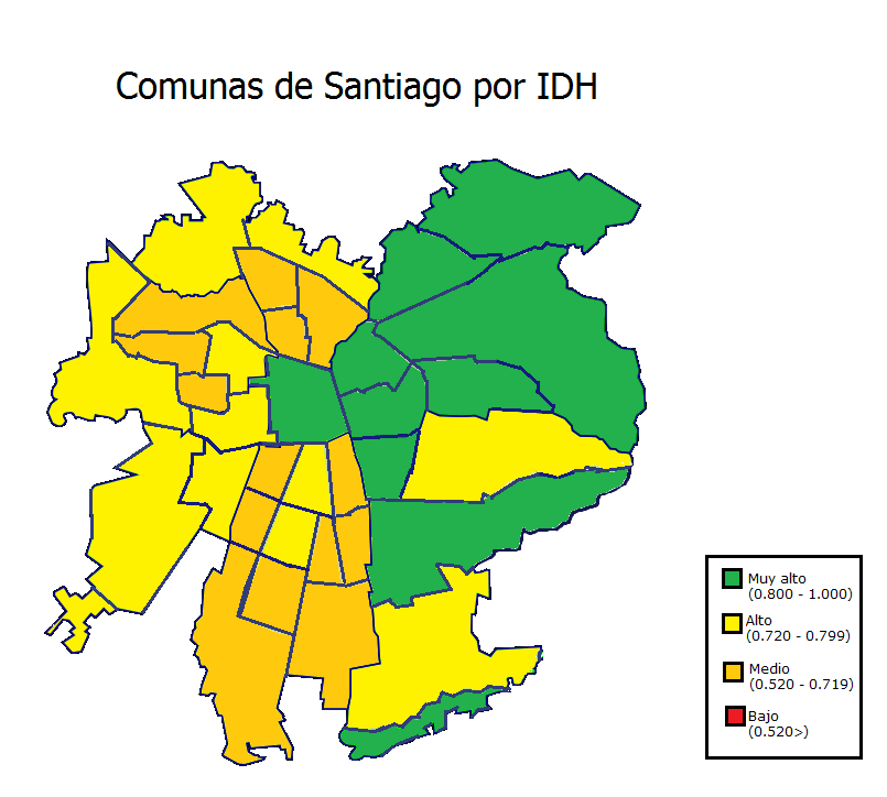 Mapa que, como señala la leyenda. muestra las distintas comunas de la ciudad de Santiago, Chile, según su Índice de Desarrollo Humano.